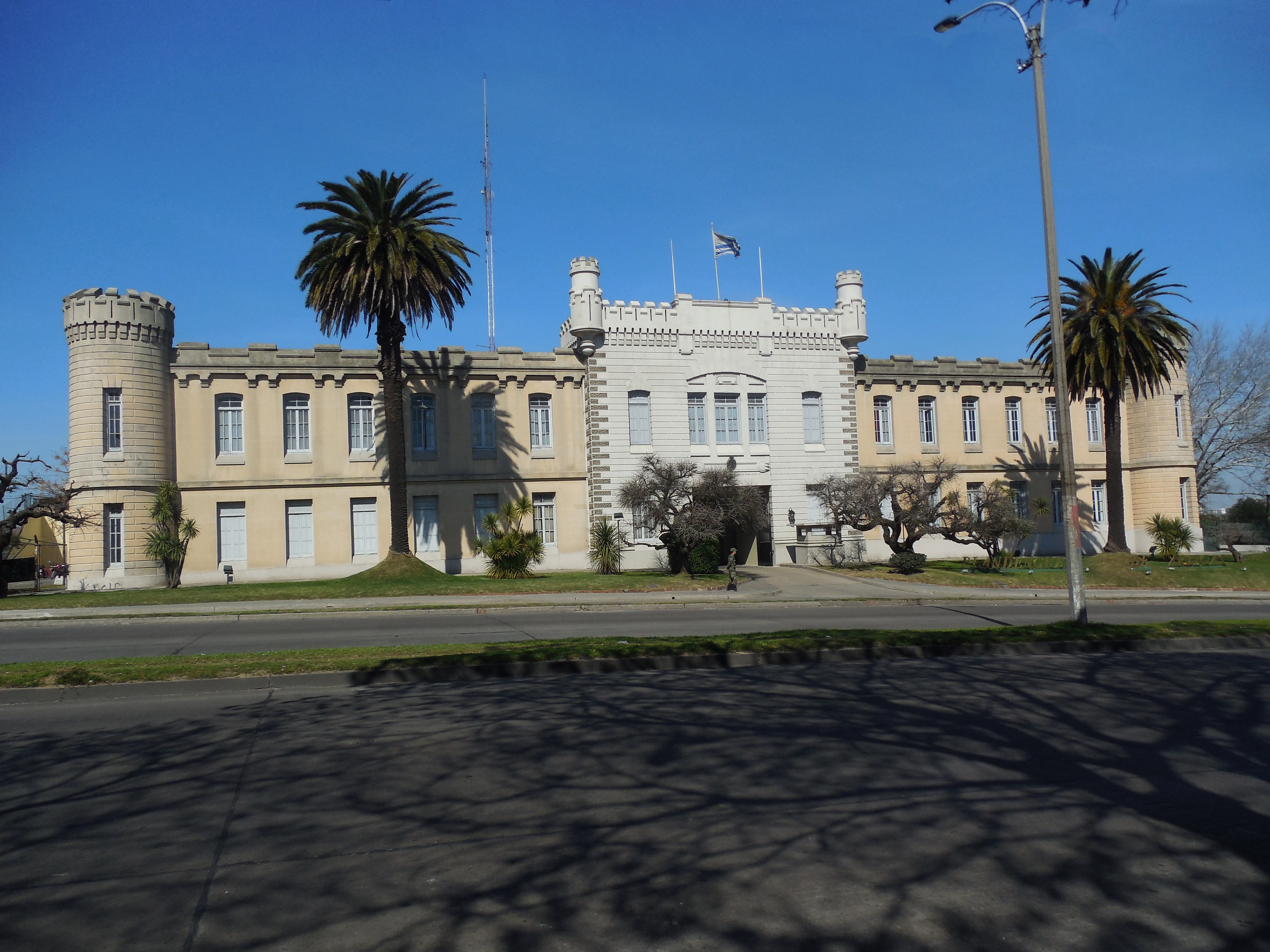 Cuartel Blandengues de Artigas. Ubicada en el departamento de Montevideo